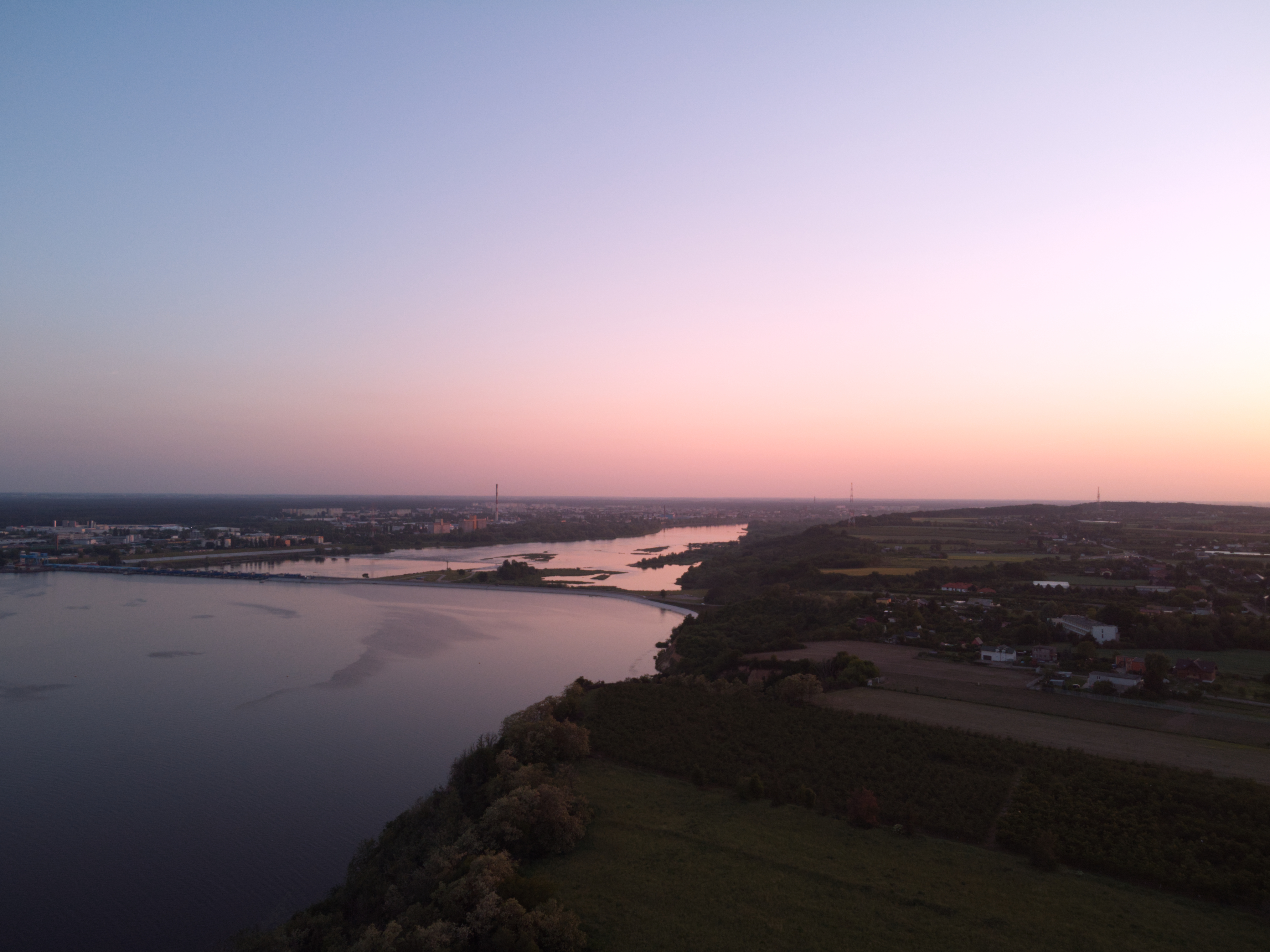 Stopień wodny we Włocławku (2020 r.)